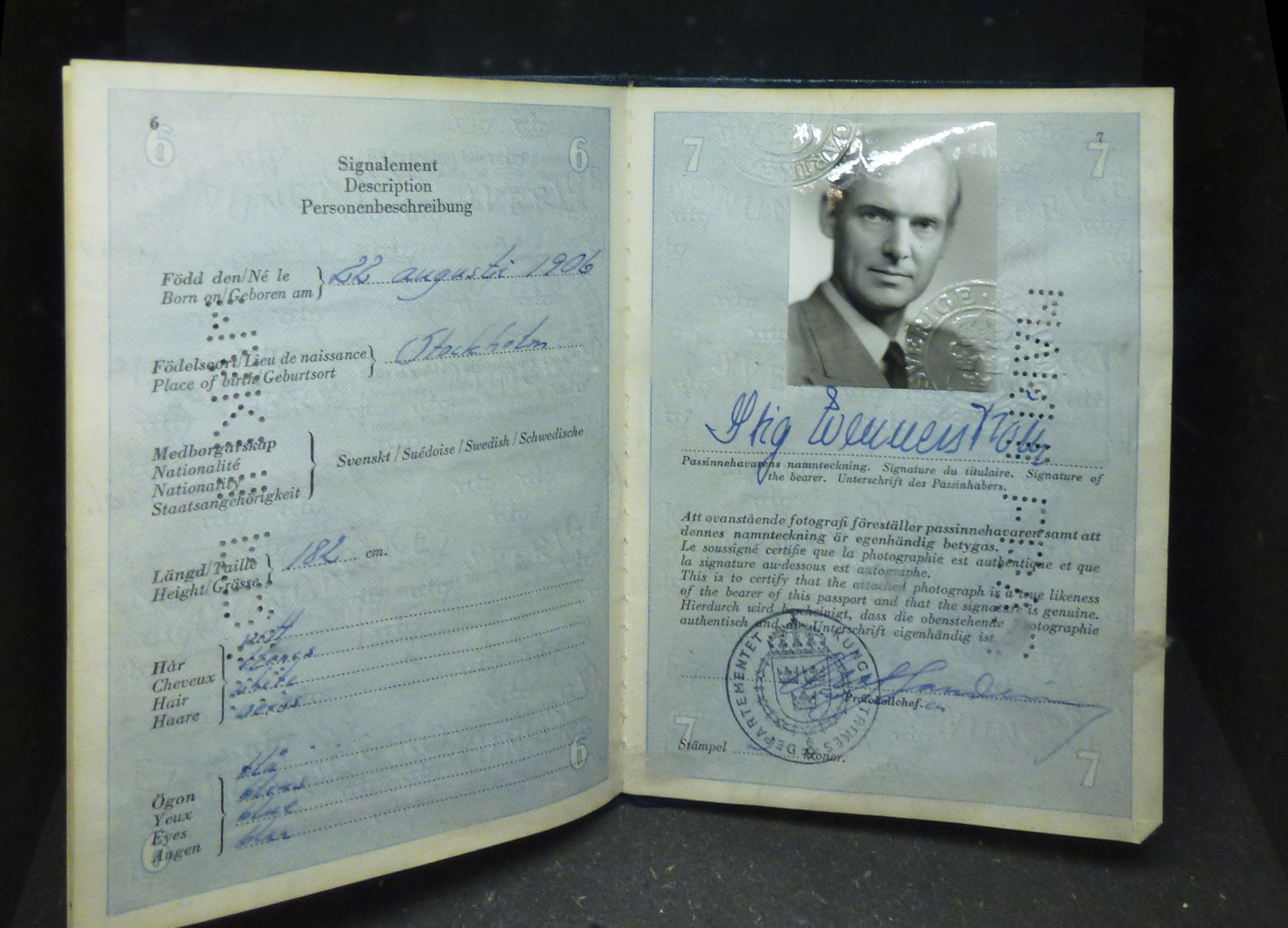 Stig Wennerströms pass på Polismuseet i Stockholm